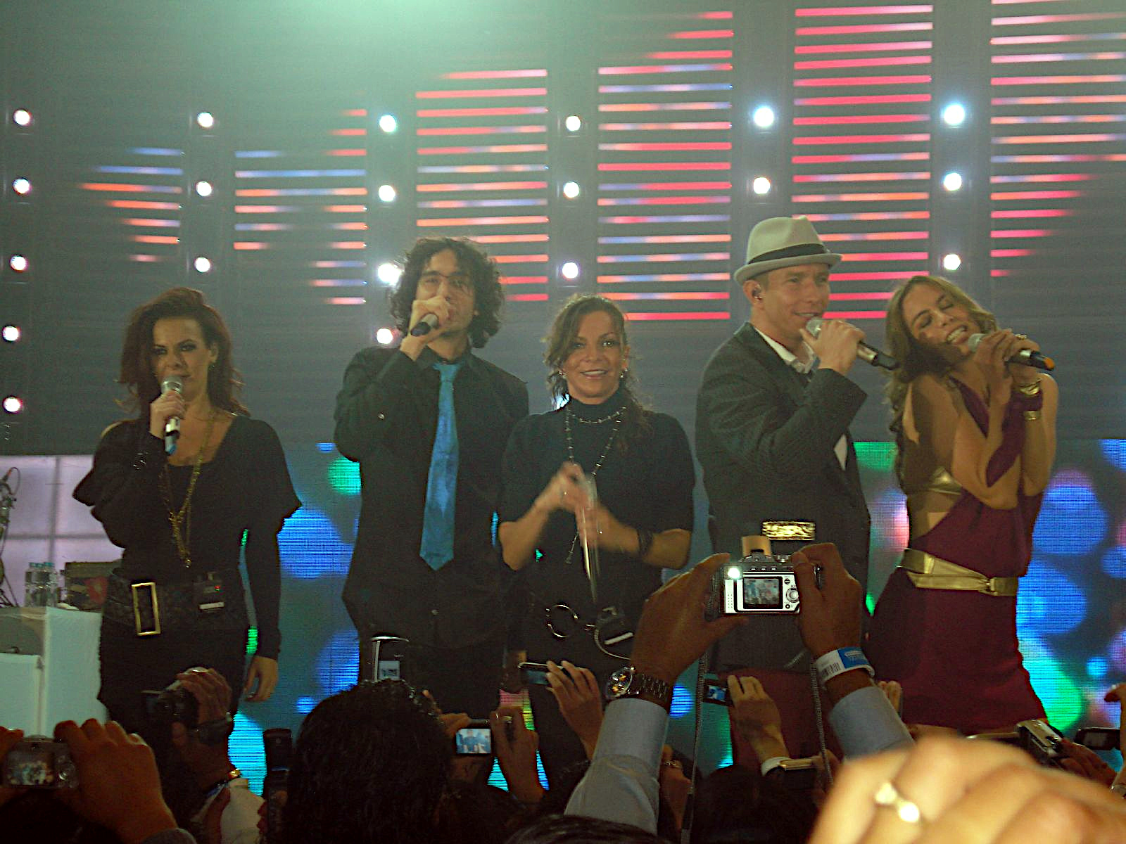 Timbiriche in Fiesta Telcel 2007